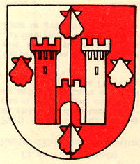 Wapen von Saint-Barthélemy Kanton Waadt Schweiz